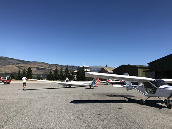 Un planejador de l'escola de vol iniciant la marxa a la pista per ser arrossegat fins l'avioneta que el farà volar.